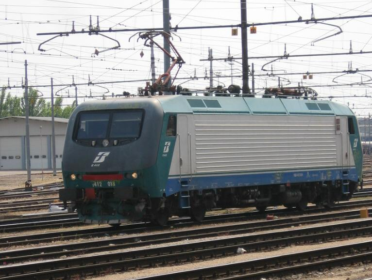 Un locomotore E.412 alla stazione di Verona Porta Nuova